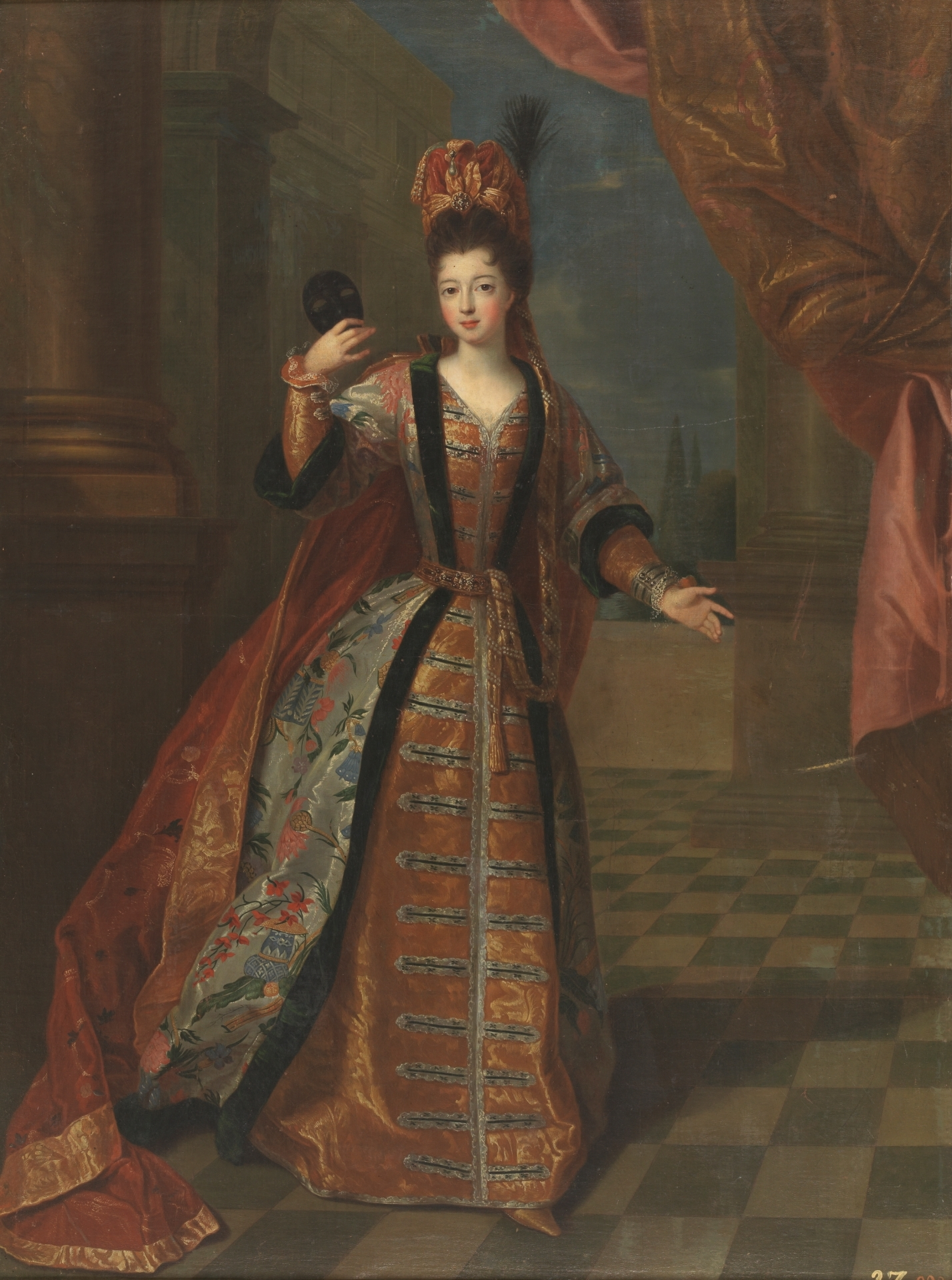 description